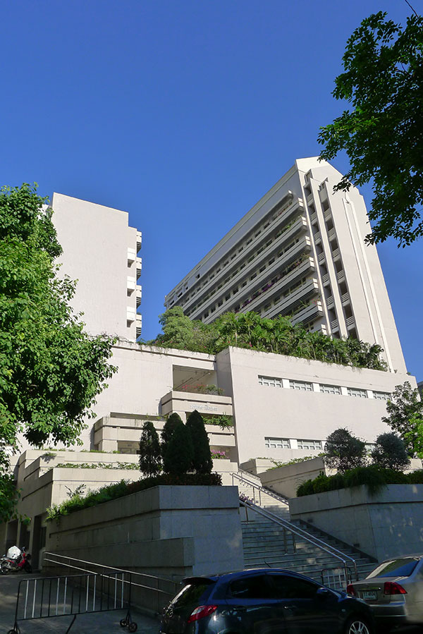 อาคารมหิตราธิเบต จุฬาลงกรณ์มหาวิทยาลัย